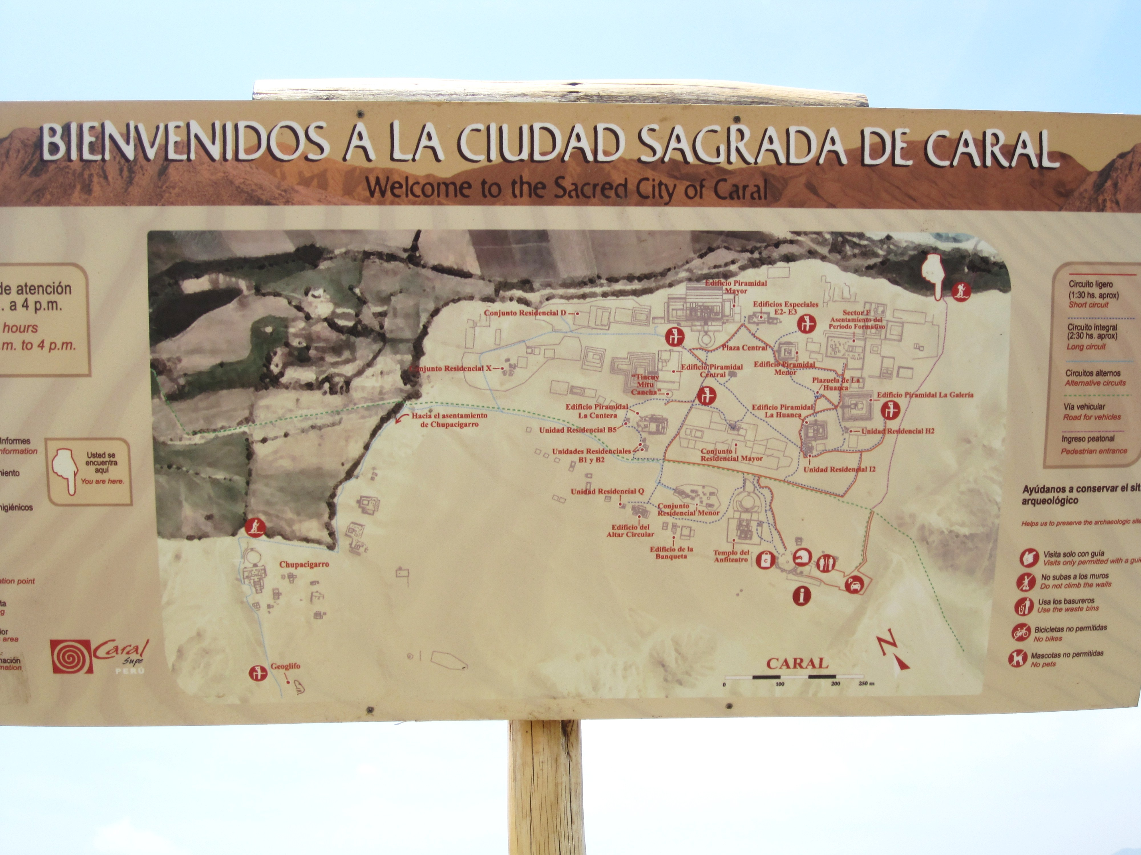 Caral, ciudad pre inca